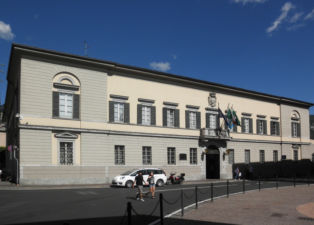 Municipio di Lecco.